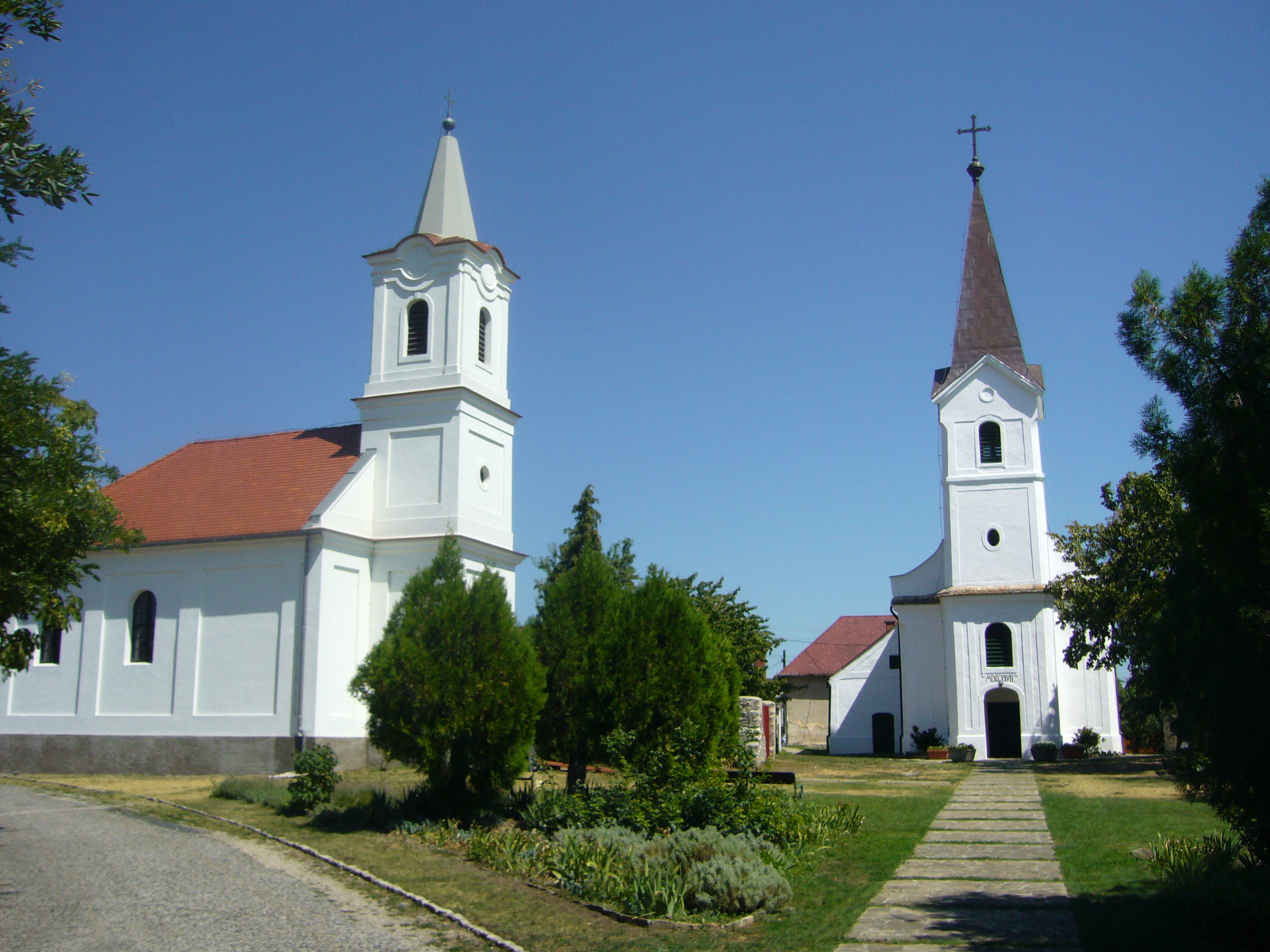 Balatonakali